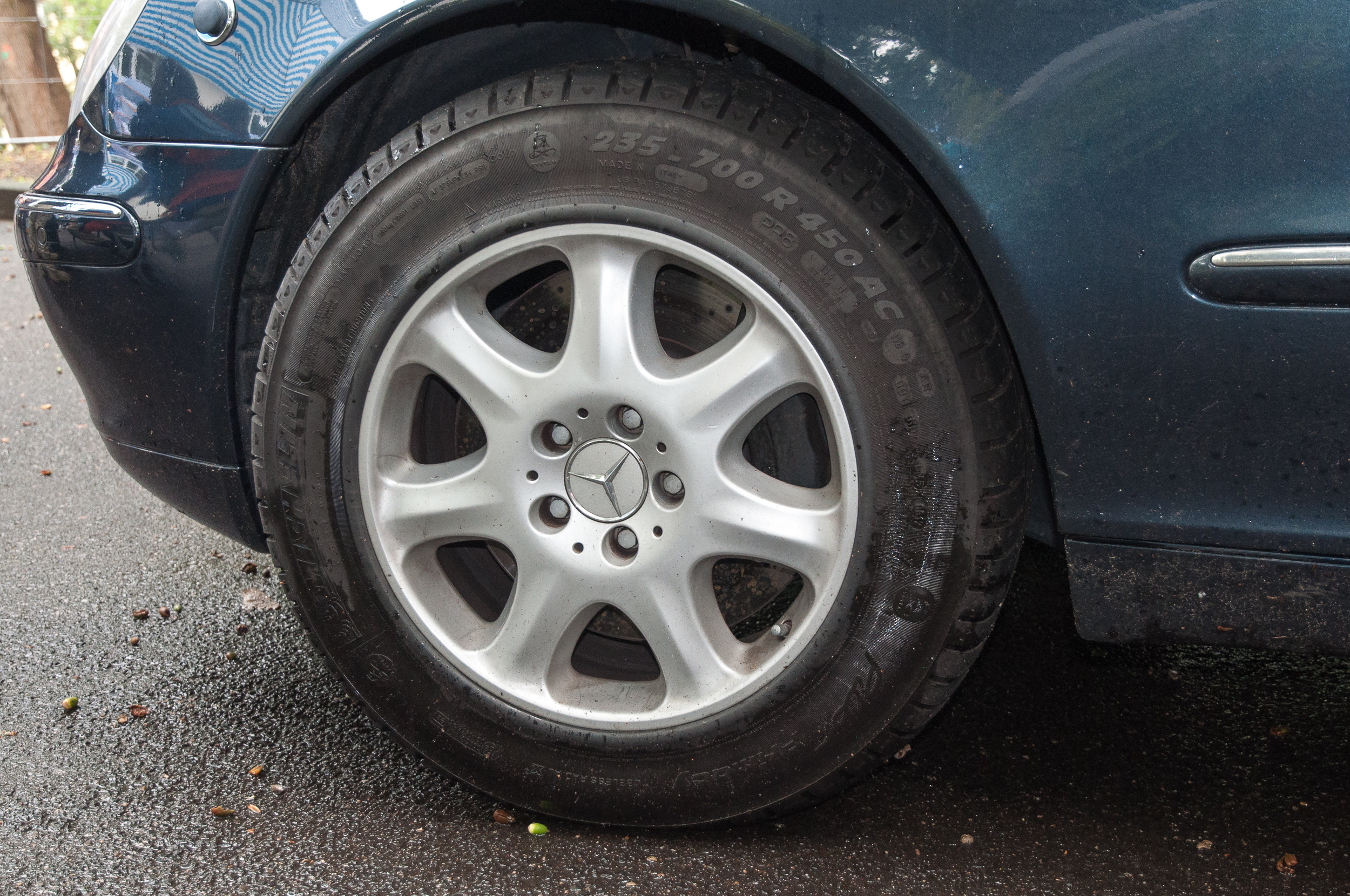 Michelin Pax Rad Mercedes-Benz S600 Guard BR 220